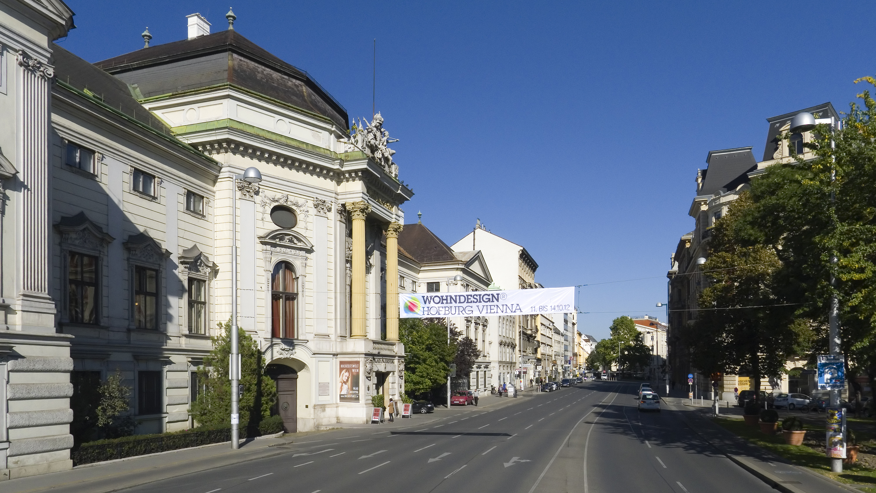 Auerspergstraße in Wien 1 beim Palais Auersperg Richtung Norden